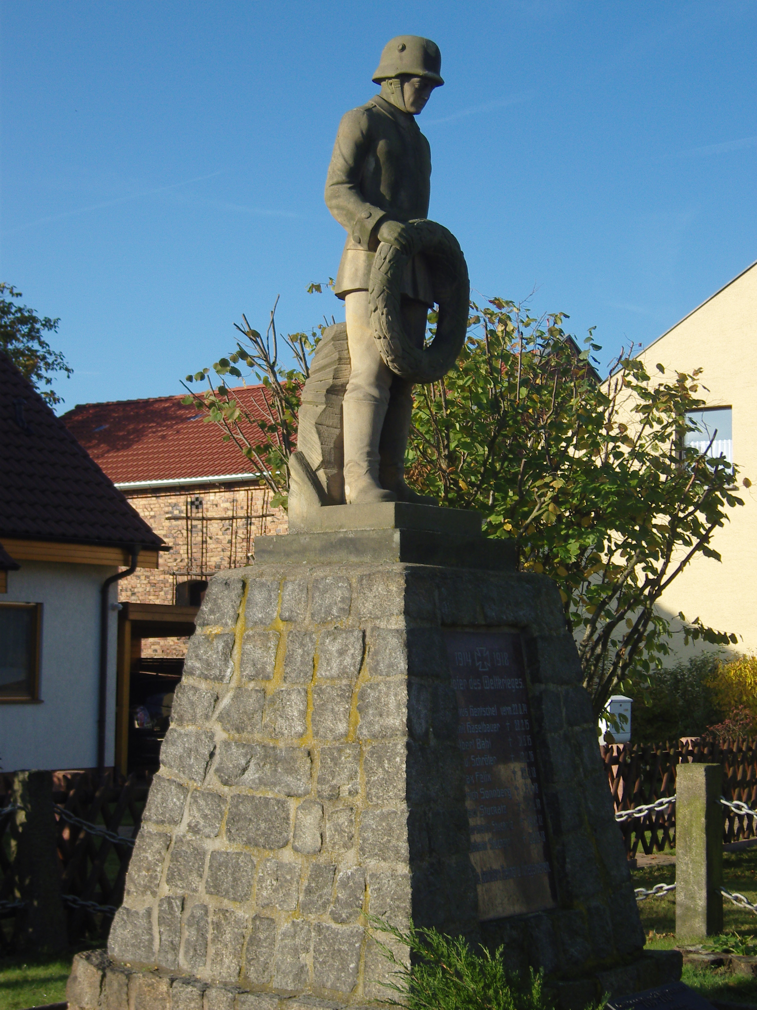 Kriegerdenkmal für die Gefallenen des Ersten Weltkriegs im Senftenberger Ortsteil Brieske